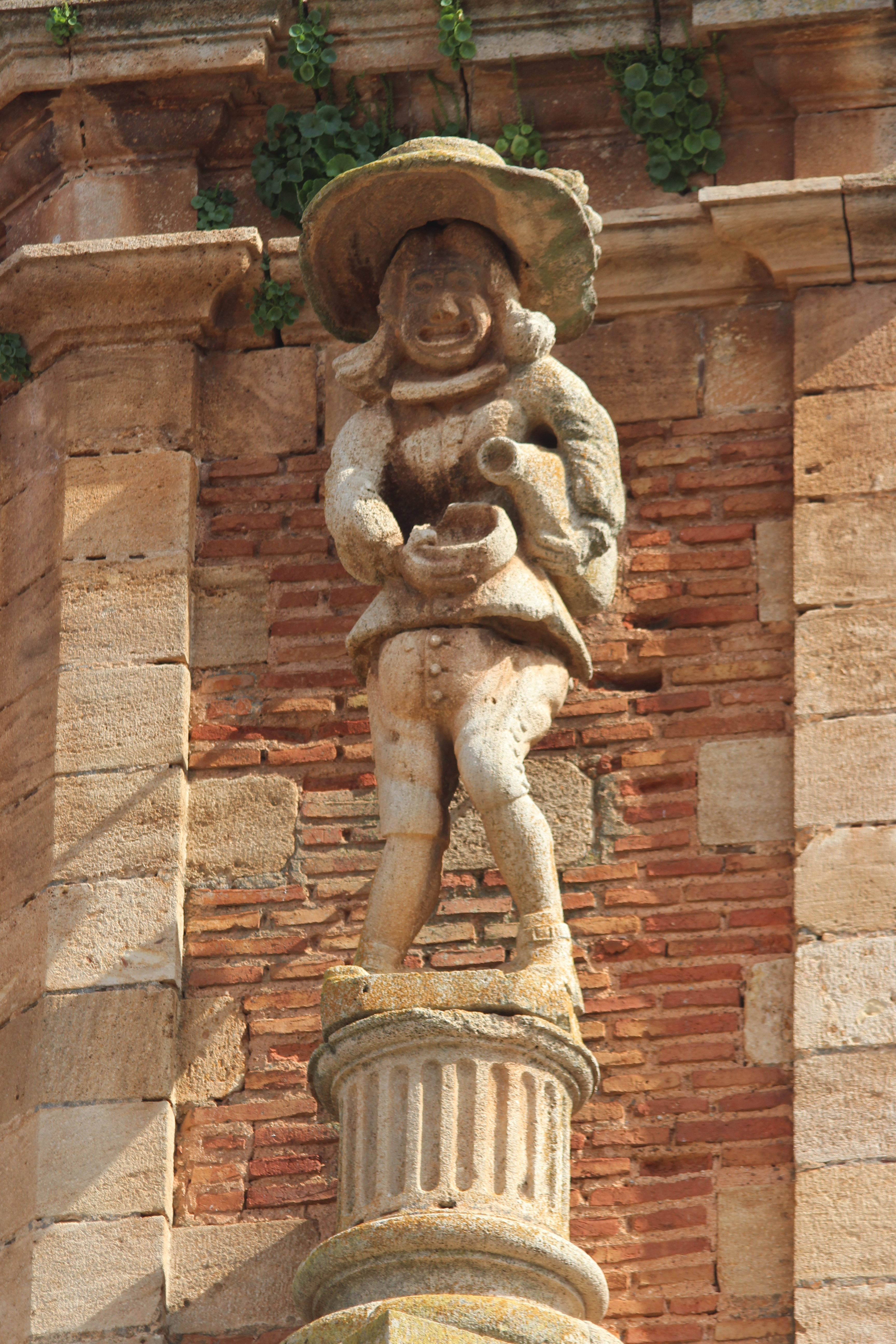 San Carlos del Valle is een gemeente in de Spaanse provincie Ciudad Real in de regio Castilië-La Mancha. Opname uit maart 2017.